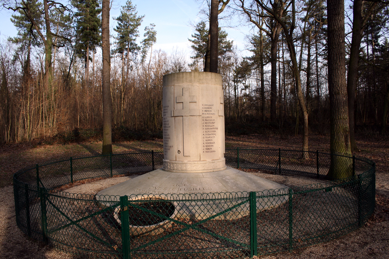 Monument aux fusillés de la cascade du Bois de Boulogne : F. Bellenger - M. Guilbert J. Bernard - G. Hemery R. Bernard - F. Hemon P. Bezet - M-H. Huchard C. Birette - G. Lorioz H. Blanchet - R. Magisson C. Bouvelle - J. Restignat P. Buchaillot - P. Rouillon R. Chalard - P. Sarrabayrouse R. Counil - J. Schlosser J. Delporte - M. Thibairenq J. Desfarges - G. Trapletti A. De Smet - L. Vannini M. Douret - R. Verdeaux J. Dubraisil-Elie - G. Verdier R. Faugeras - J. Veron B. Gante - P. Weczerka J. Gay